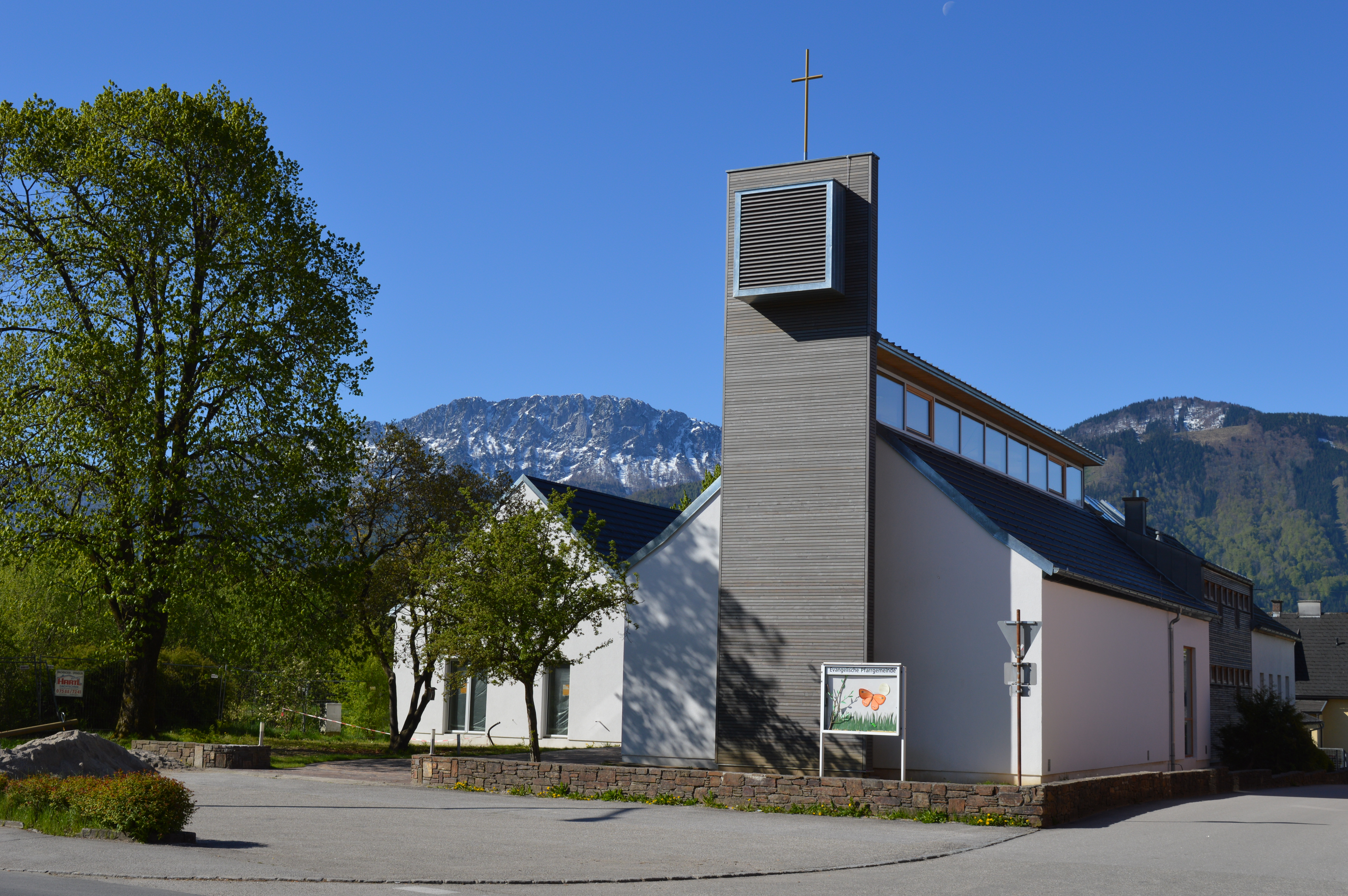 Evangelische Kirche A.B. zum Guten Hirten in Kirchdorf an der Krems: Das renovierte Kirchengebäude (2017)